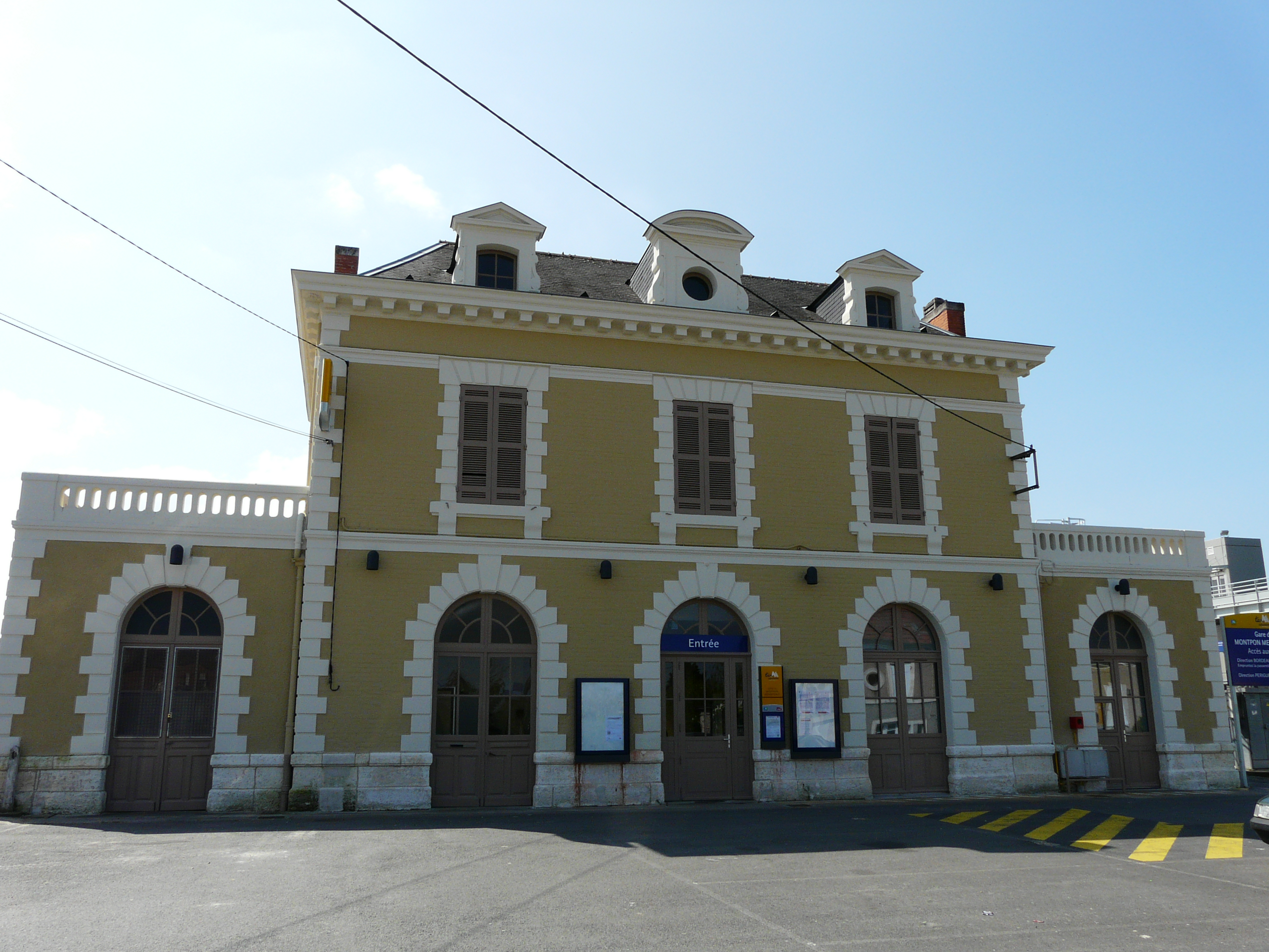 Le bâtiment de la gare de Montpon-Ménestérol, Dordogne, France.